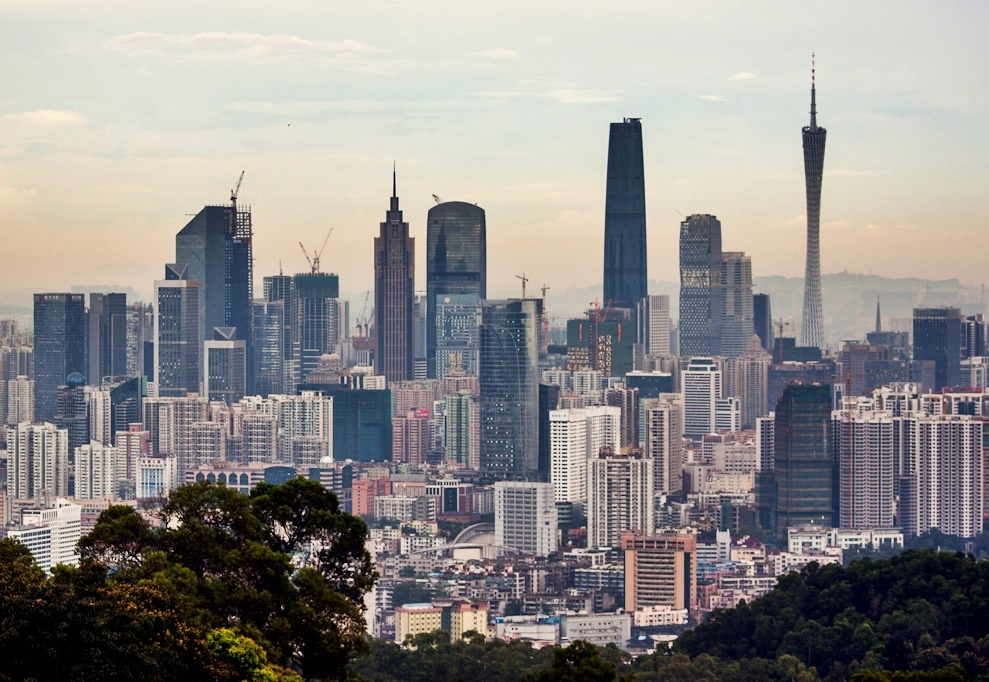 Guangzhou skyline